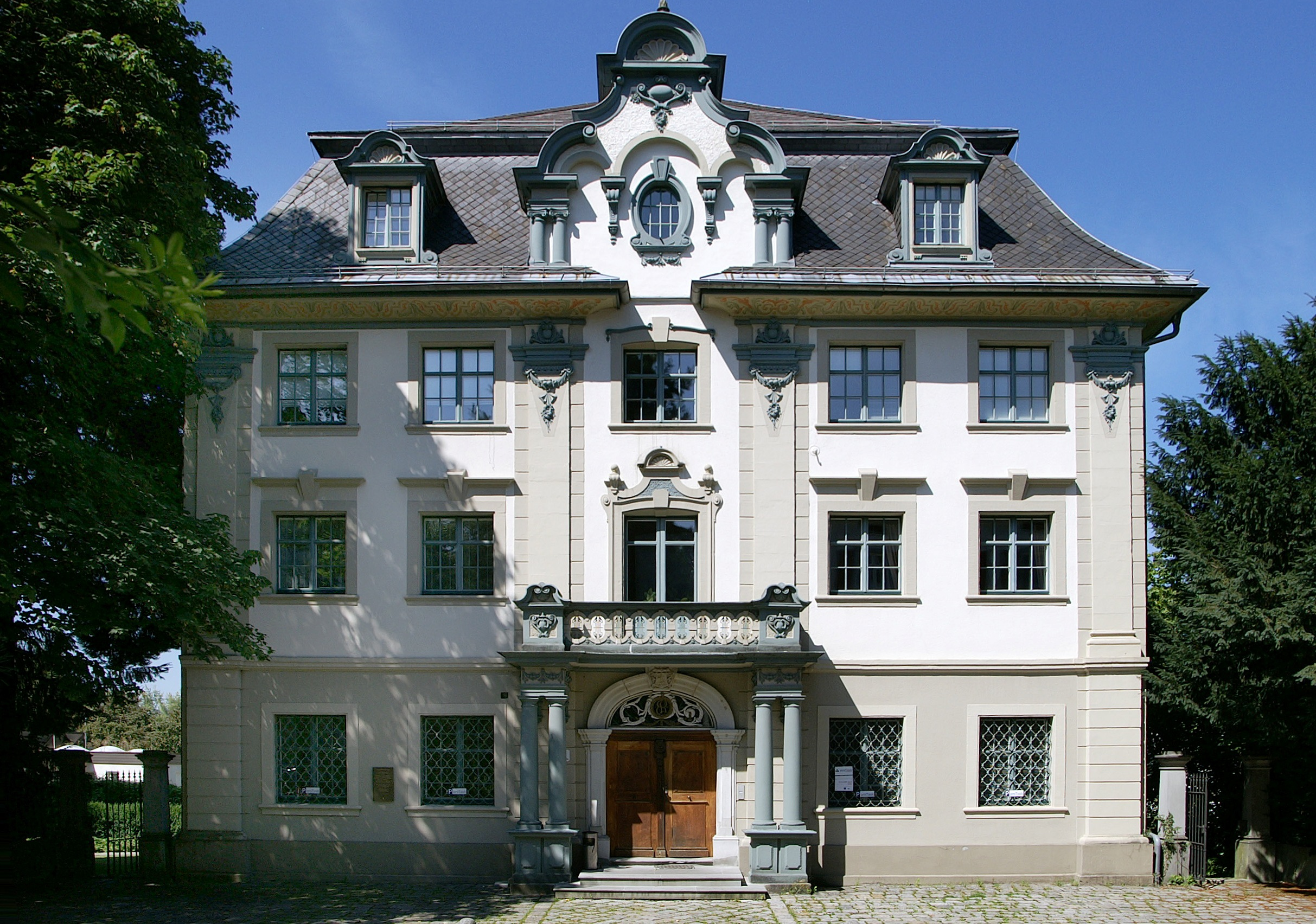 Landeshauptmann Adolf-Rhomberg-Haus erbaut 1798, Marktstraße 26 in Dornbirn (1900) Umbau von Architekt Hanns Kornberger